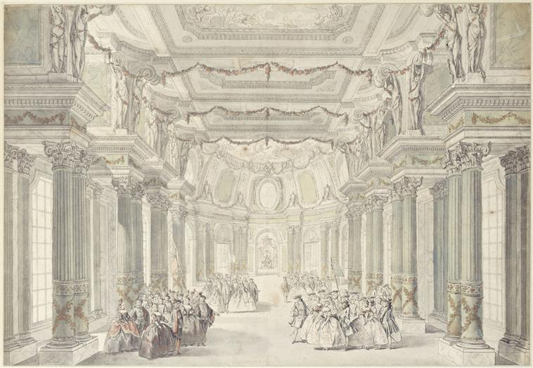 Représentation de la comédie-ballet de " La Princesse de Navarre" donné dans la salle de spectacle installée dans le manège de la Grande-Ecurie de Versailles à l'occasion du mariage du Dauphin Louis (fils de Louis XV) avec l'infante Marie-Thérèse-Raphaëlle d'Espagne le 23 février 1745. Ballet de Jean-Philippe Rameau.